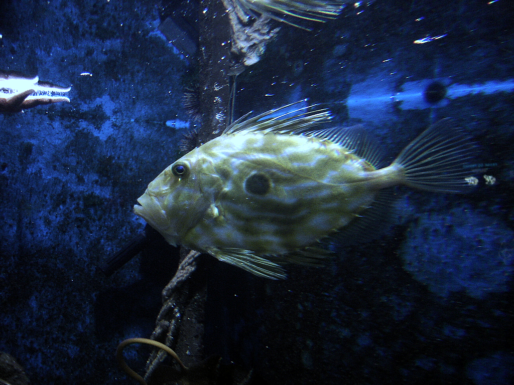 Zeus faber